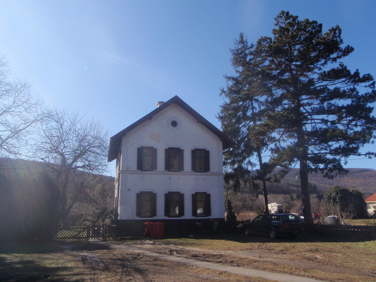 Bahnhof Rattersdorf, heute Wohnung